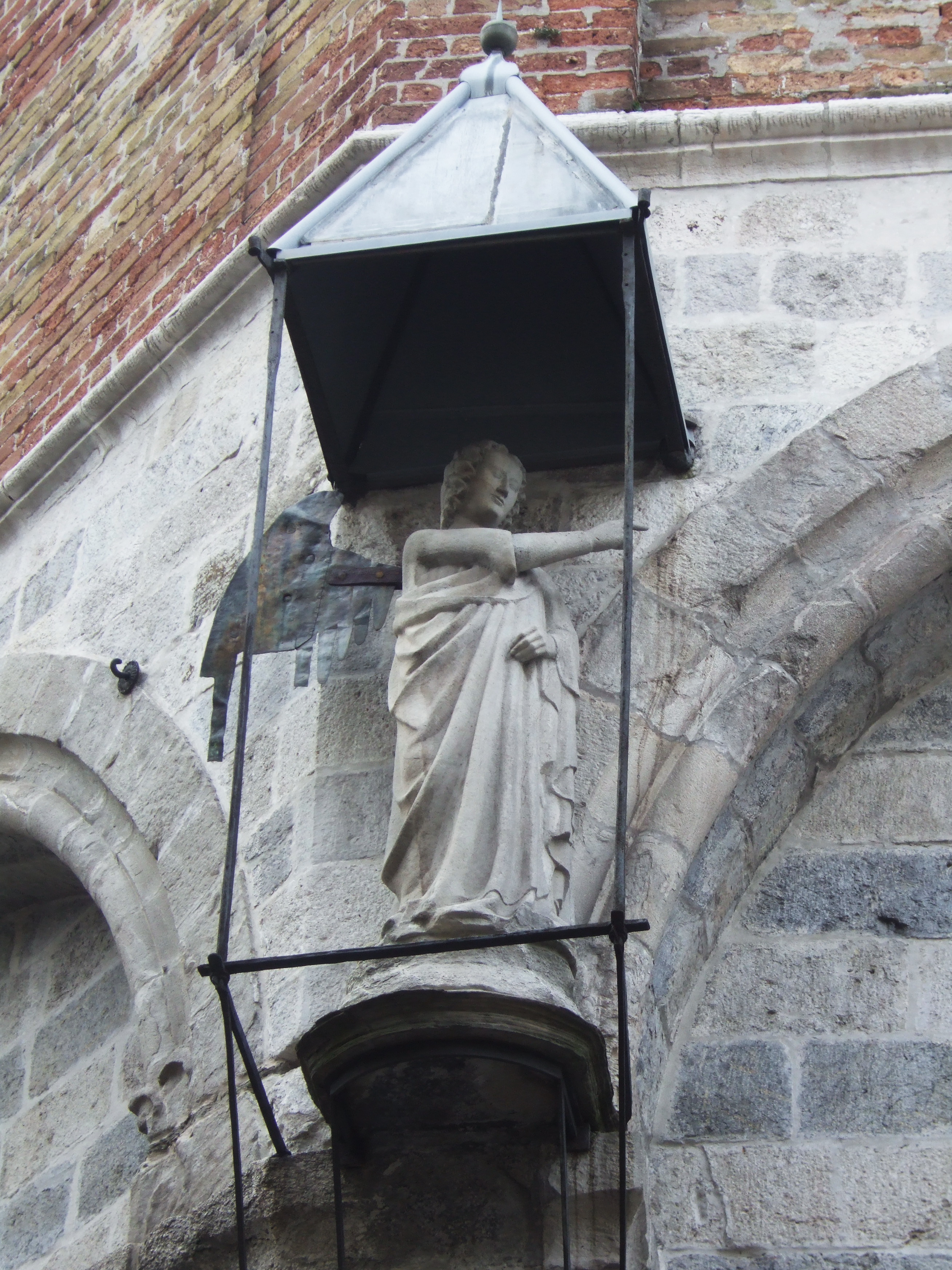 Duomo di Udine - Arcangelo Gabriele - seconda metà XIV secolo